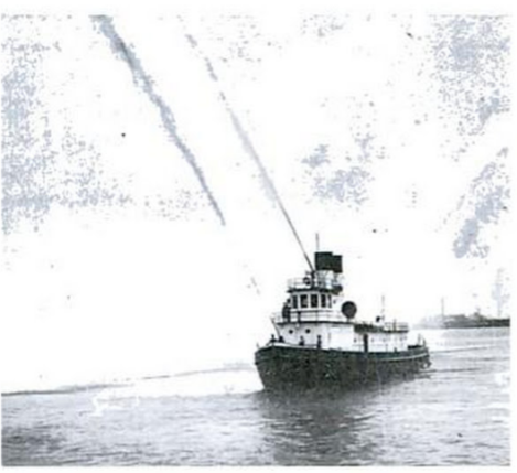 Fireboat William A. McGonagle, circa 1910.